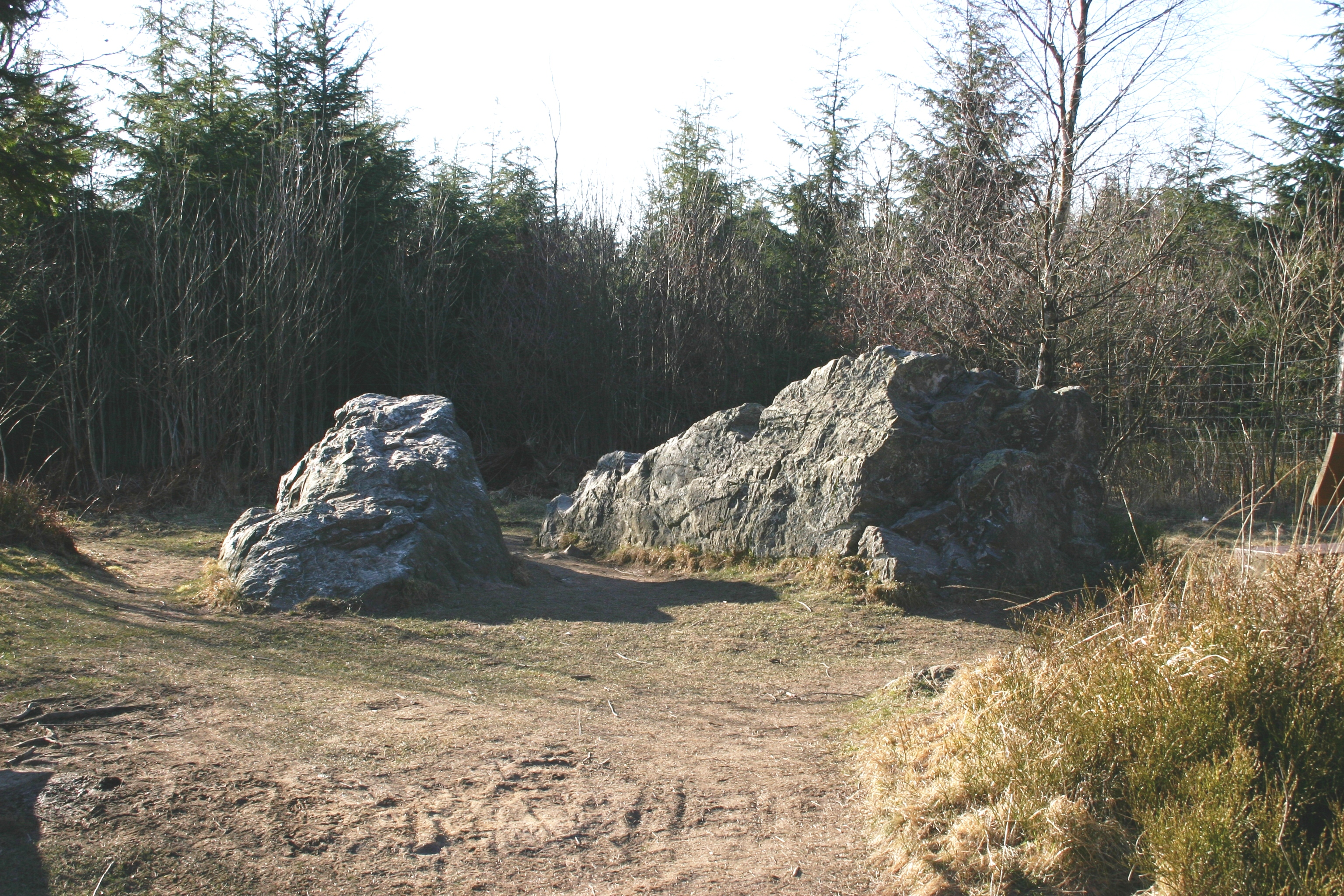 D'Fielse wou de Karel Grousse soll geschlof hunn.